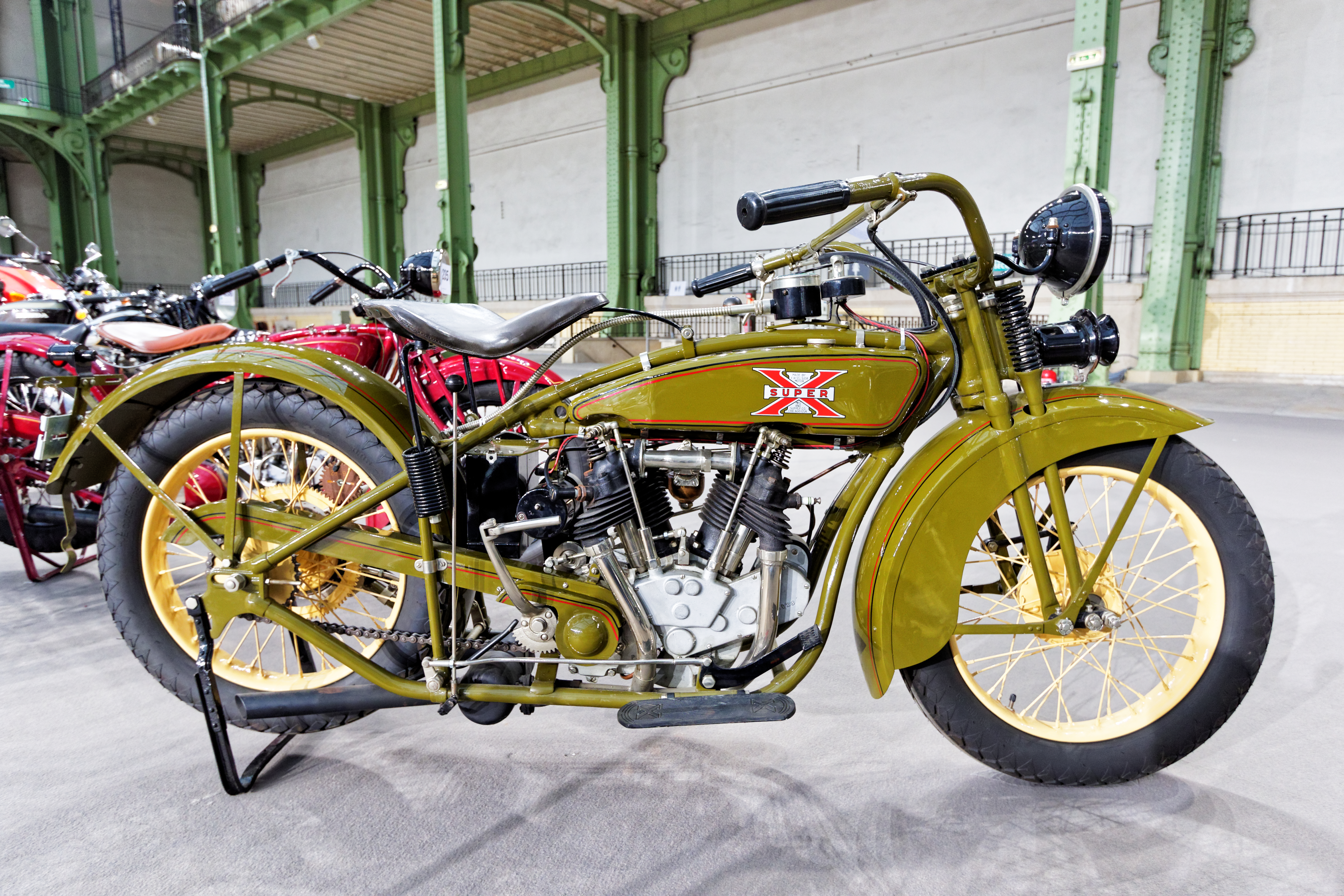 Un des véhicules présenté lors de la vente aux enchères Bonhams 2016 au Grand Palais de Paris.